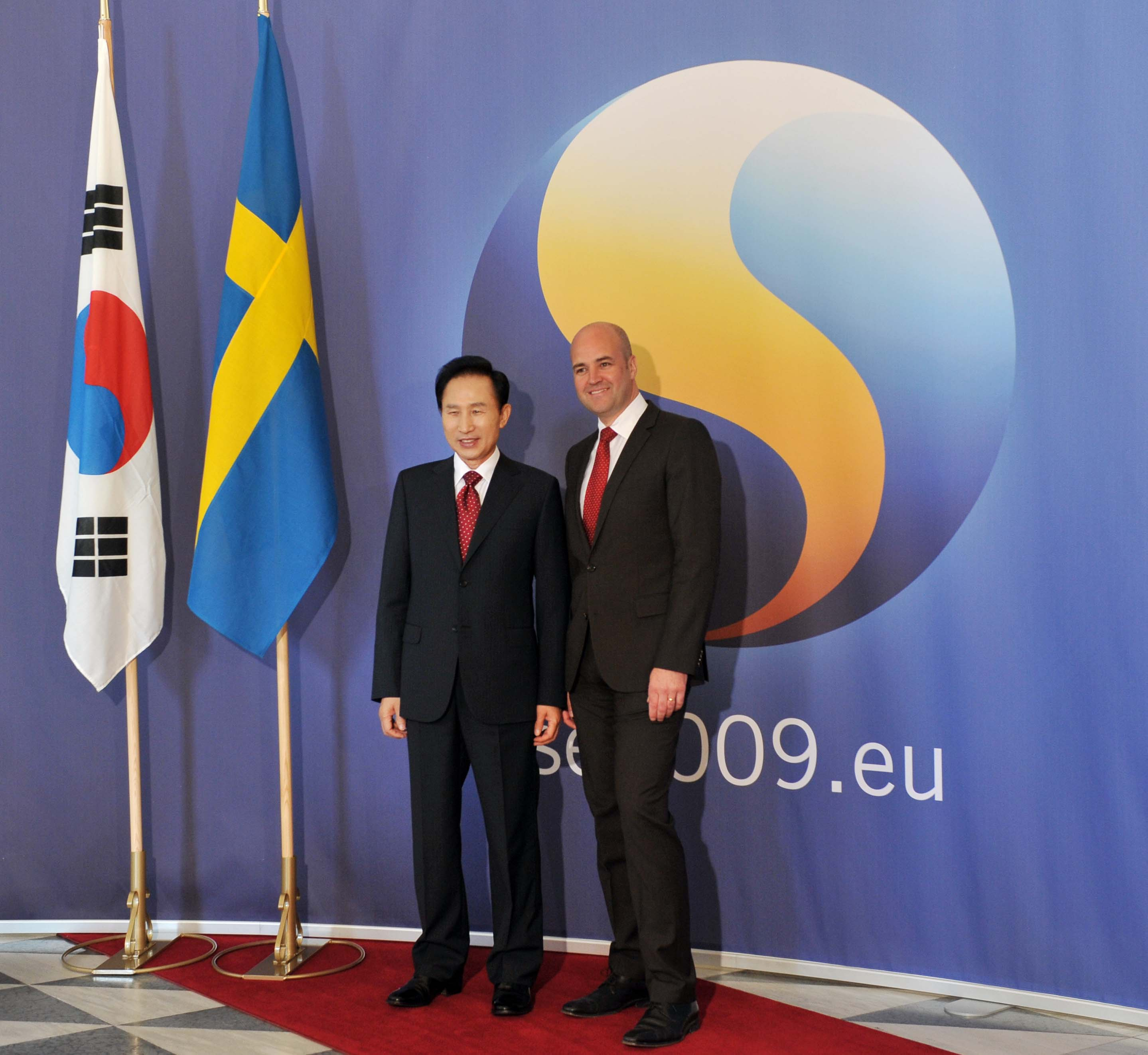 President Lee meets Prime Minister Fredrik Reinfeldt of Sweden